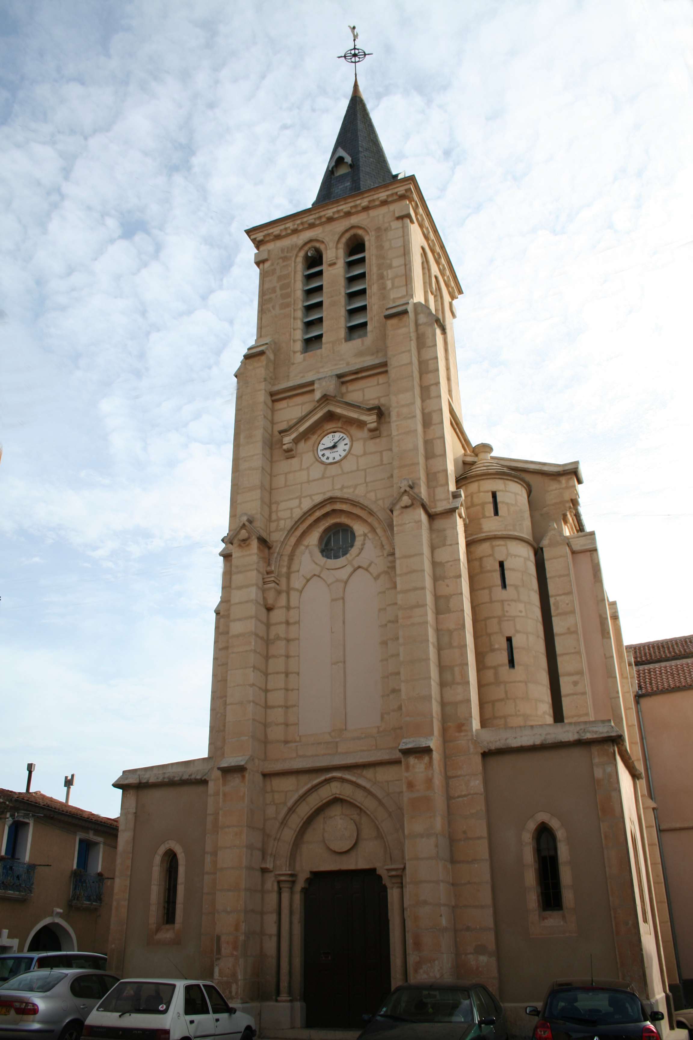 Pinet (Hérault) - église Saint-Siméon-le-Stylite.